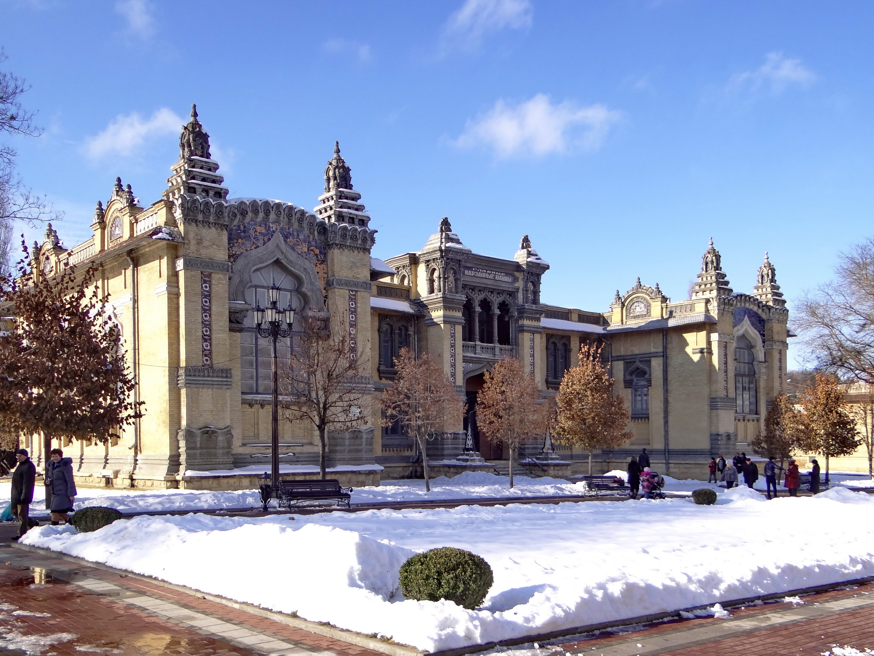 Комплекс Главных нарзанных ванн: бульвар Курортный, 4 (быв. проспект 50-летия Октября), Кисловодск, Ставропольский край